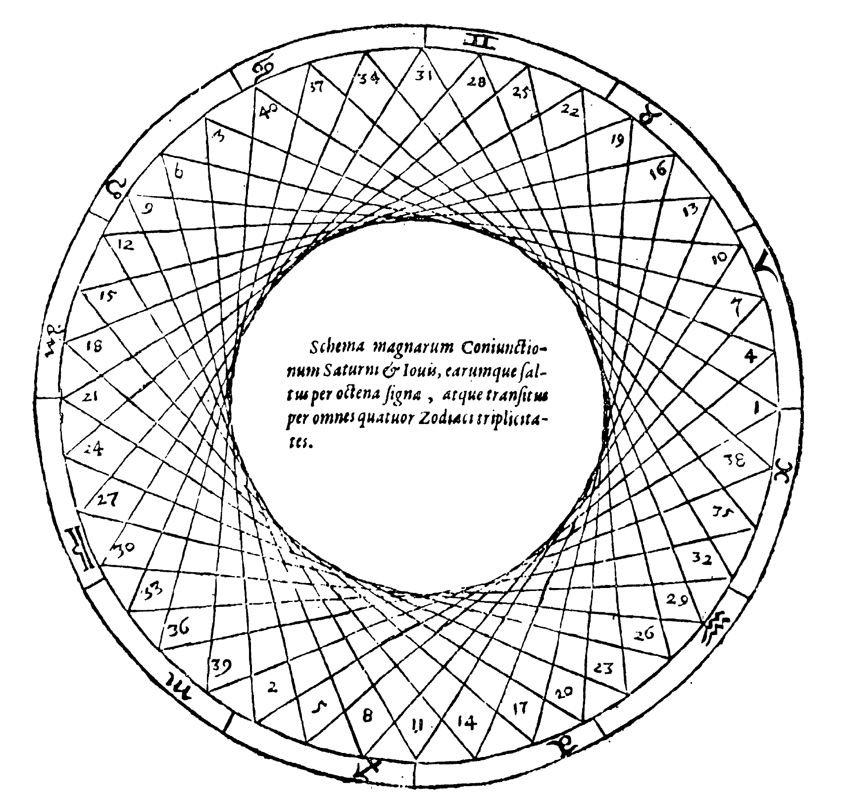 Pospojovaná místa konjunkcí Saturnu a Jupiteru uvnitř kruhu rozděleného na znamení zvěrokruhu, které tvoří prázdný kruh. Na tento jev v roce 1595 při výuce na evangelické škole ve Štýrském Hradci přišel německý astronom a teolog Johannes Kepler.